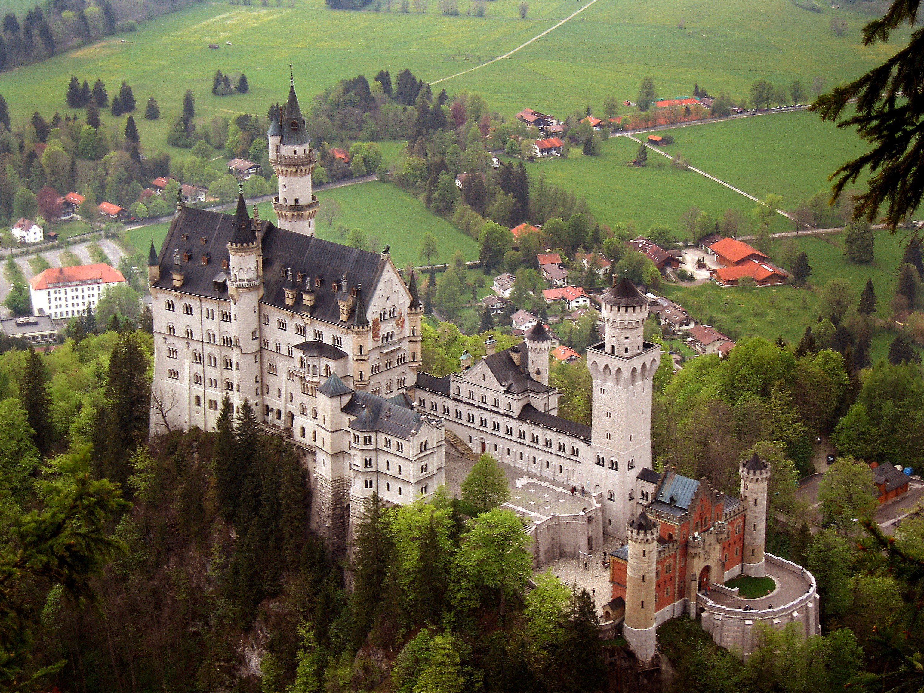 The Neuschwanstein castle.